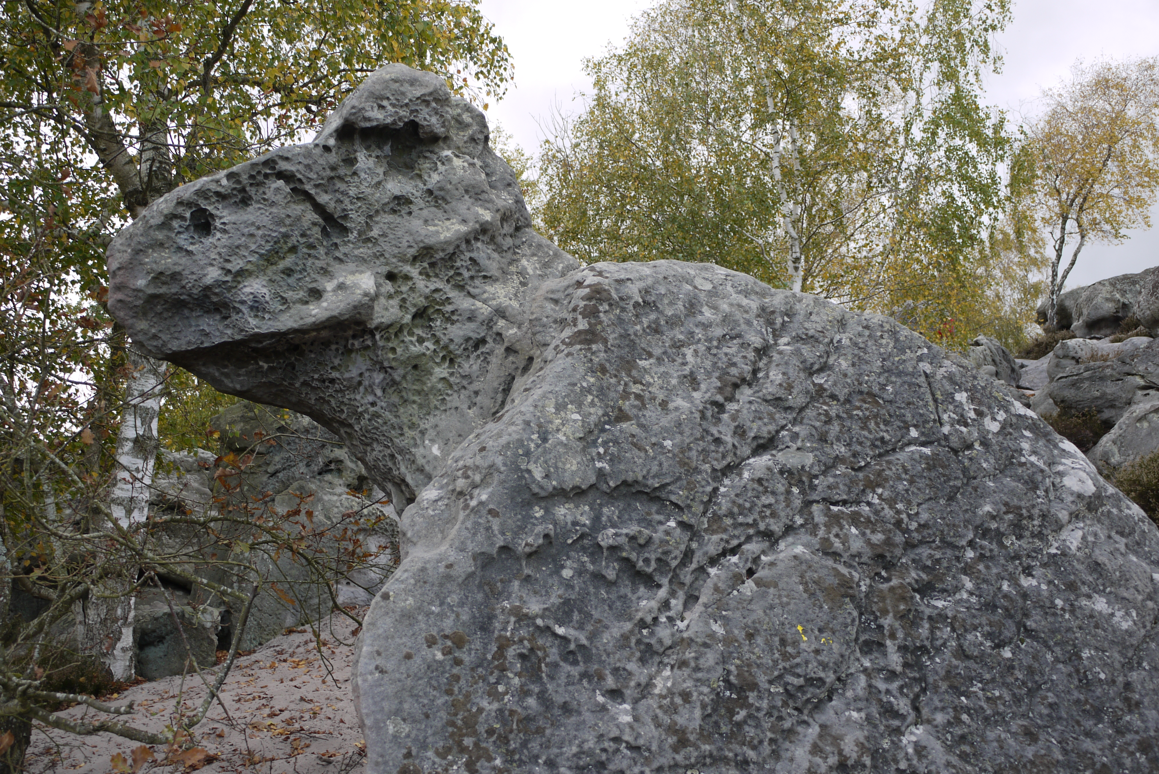 Chaos rocheux de la hottée du diable, à Coincy (Aisne)